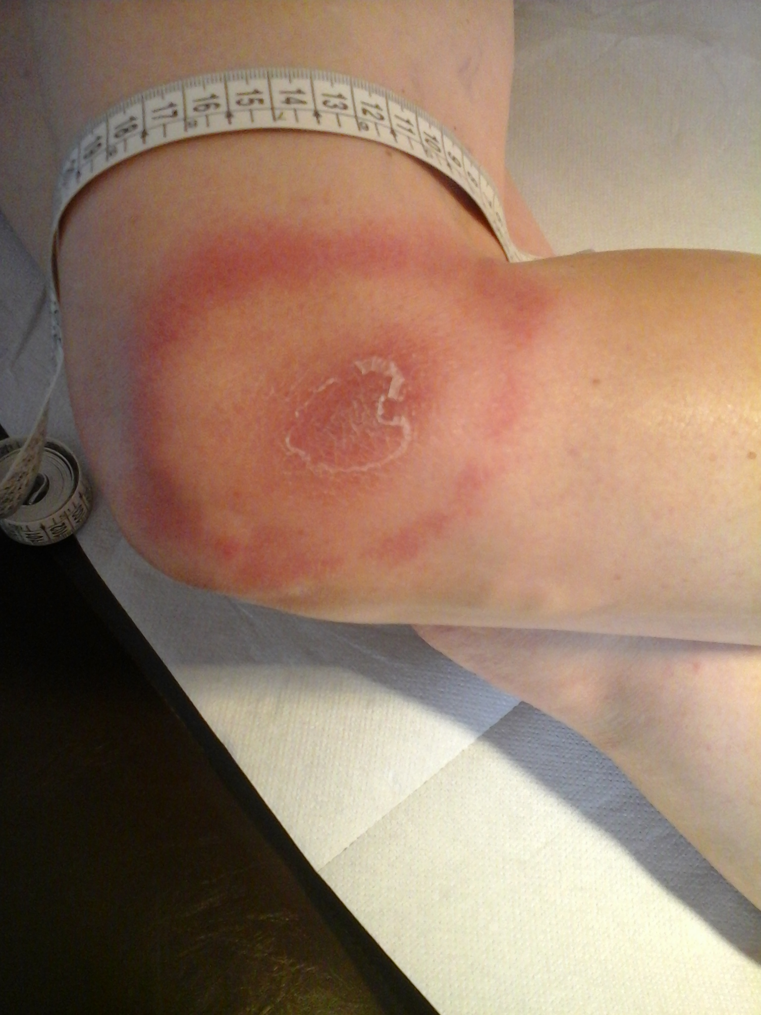 Aspect typiquement fréquent d'un érythème migrant (maladie de Lyme) localisé au genou, avec lésions scléreuses de l'épiderme plus rarement observée